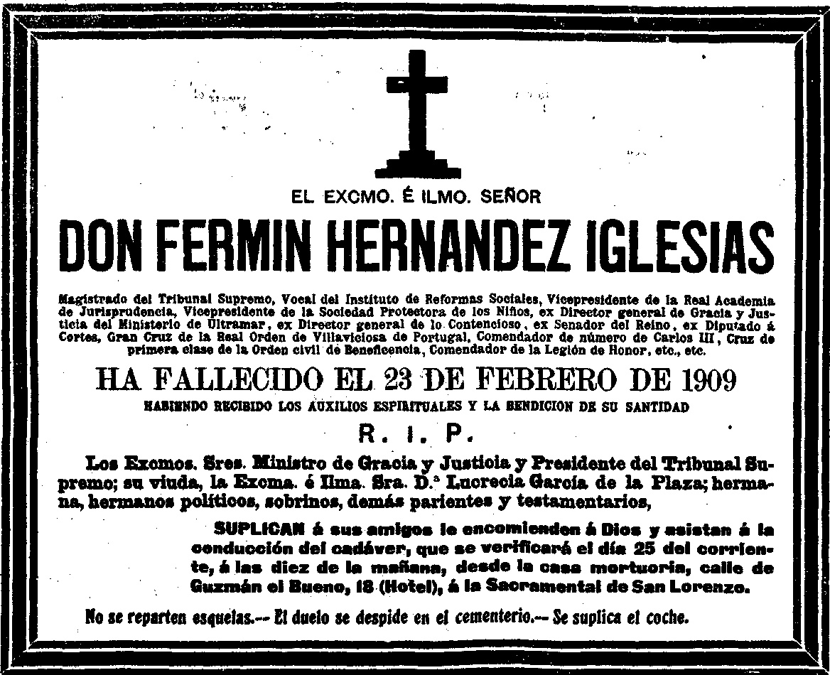 Esquela publicada en La Correspondencia de España del 25 de febrero de 1909. Hemeroteca Digital. Biblioteca Nacional de España